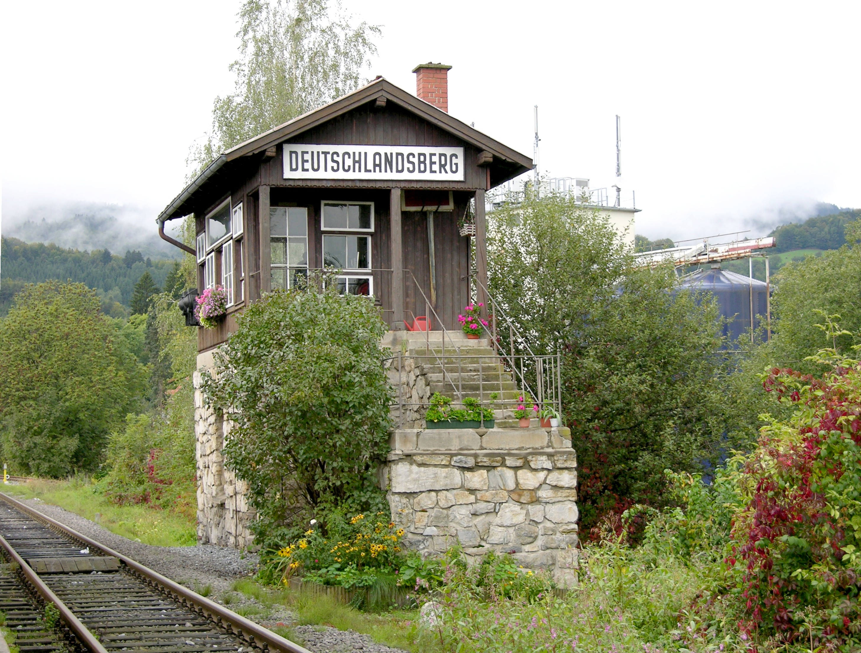 Das alte Stellwerk am Bahnhof von Deutschlandsberg, Steiermark